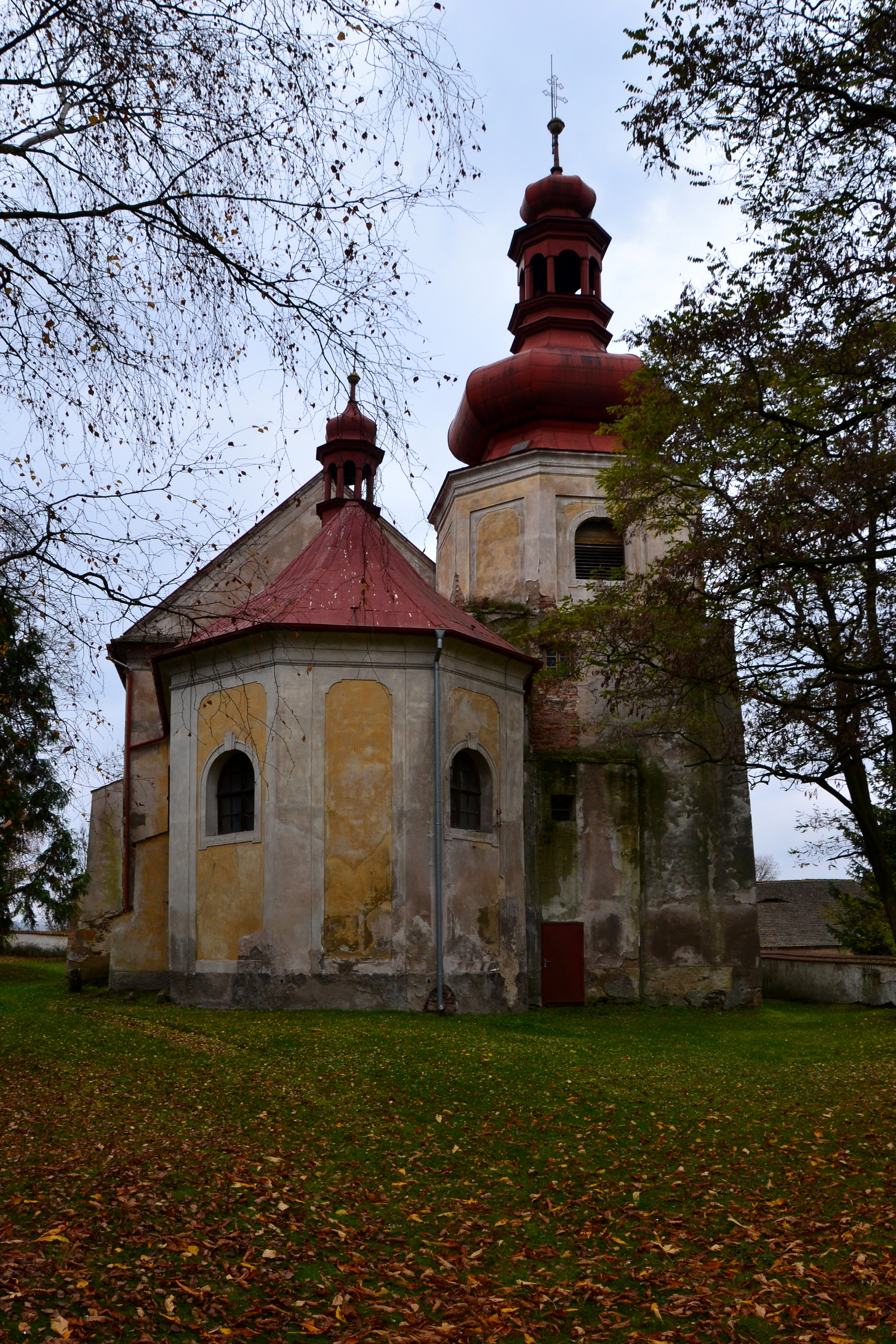 Kostel svatého Mikuláše, Vilémov (okres Chomutov).